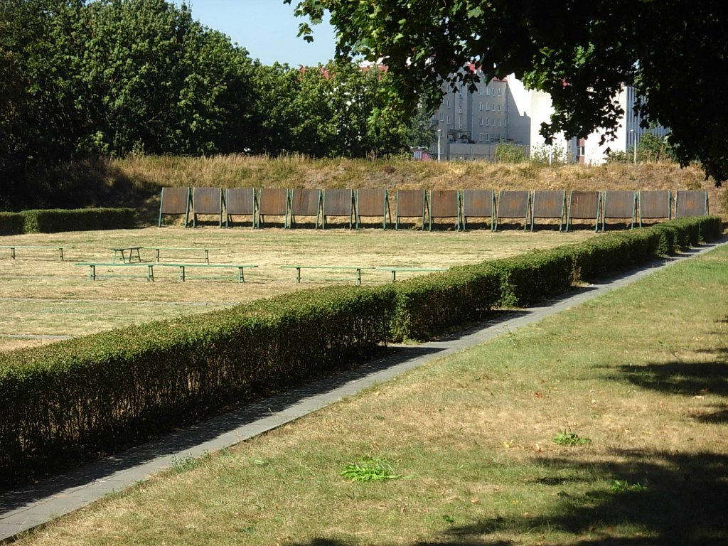 Tor łuczniczy w Bydgoszczy